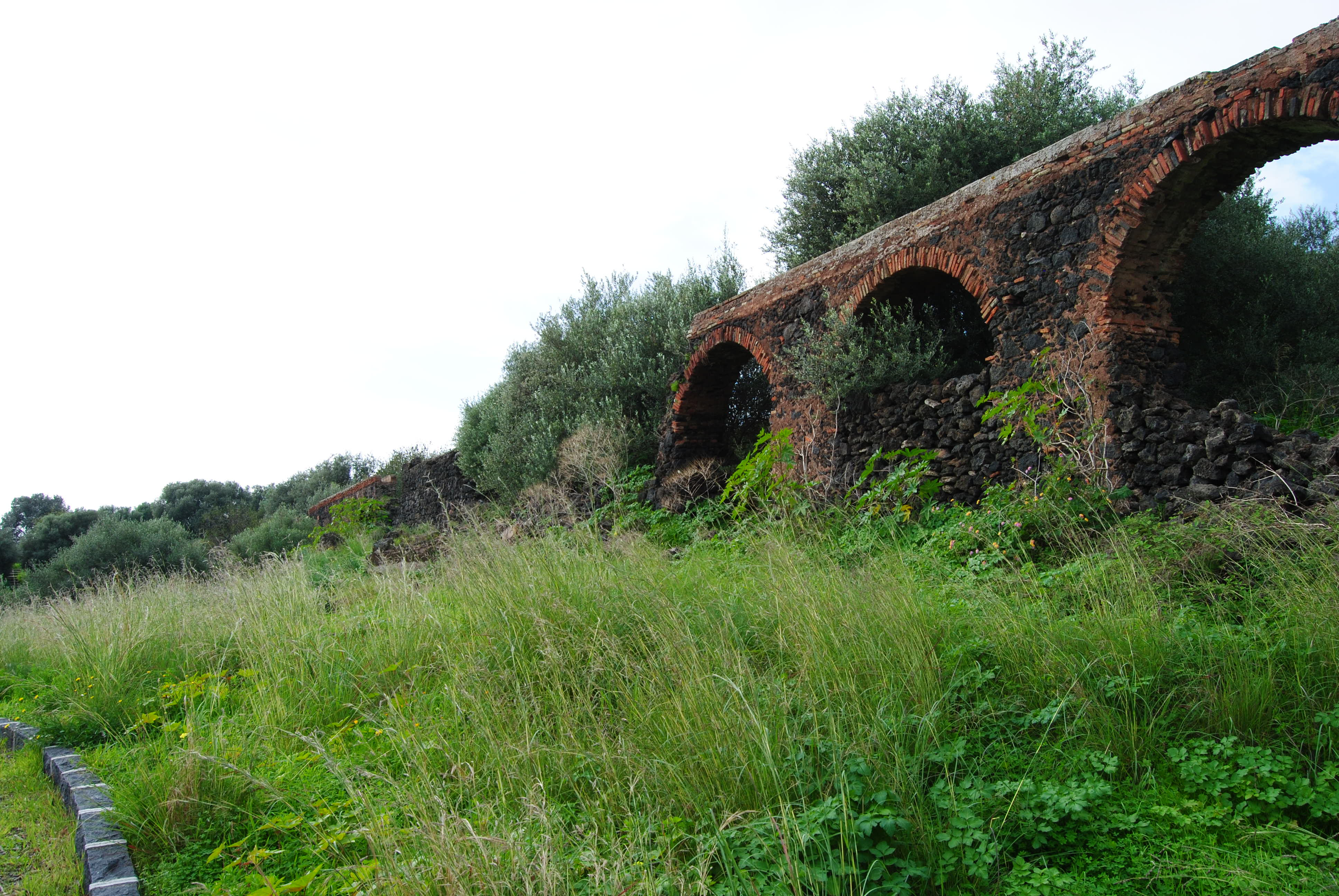 Ruderi dell'Acquedotto catanese del 1649. Porzione sita nel Parco Gioeni.